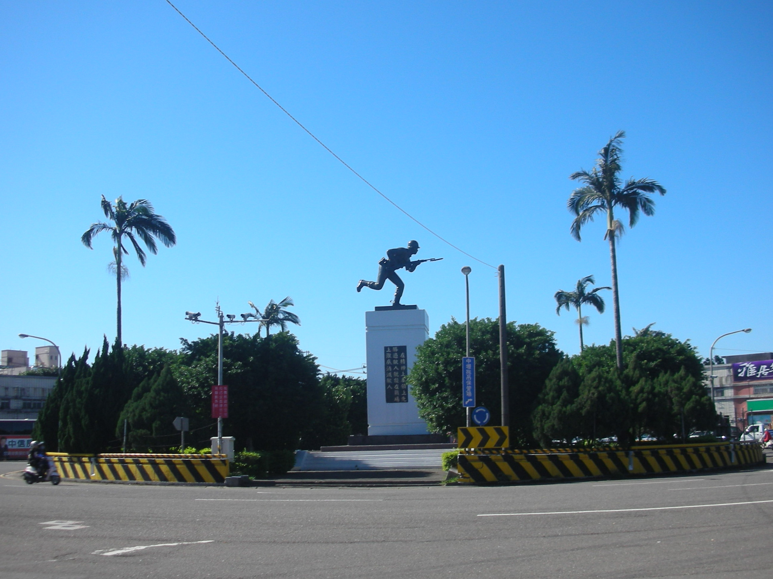 桃園縣中壢市龍岡圓環。